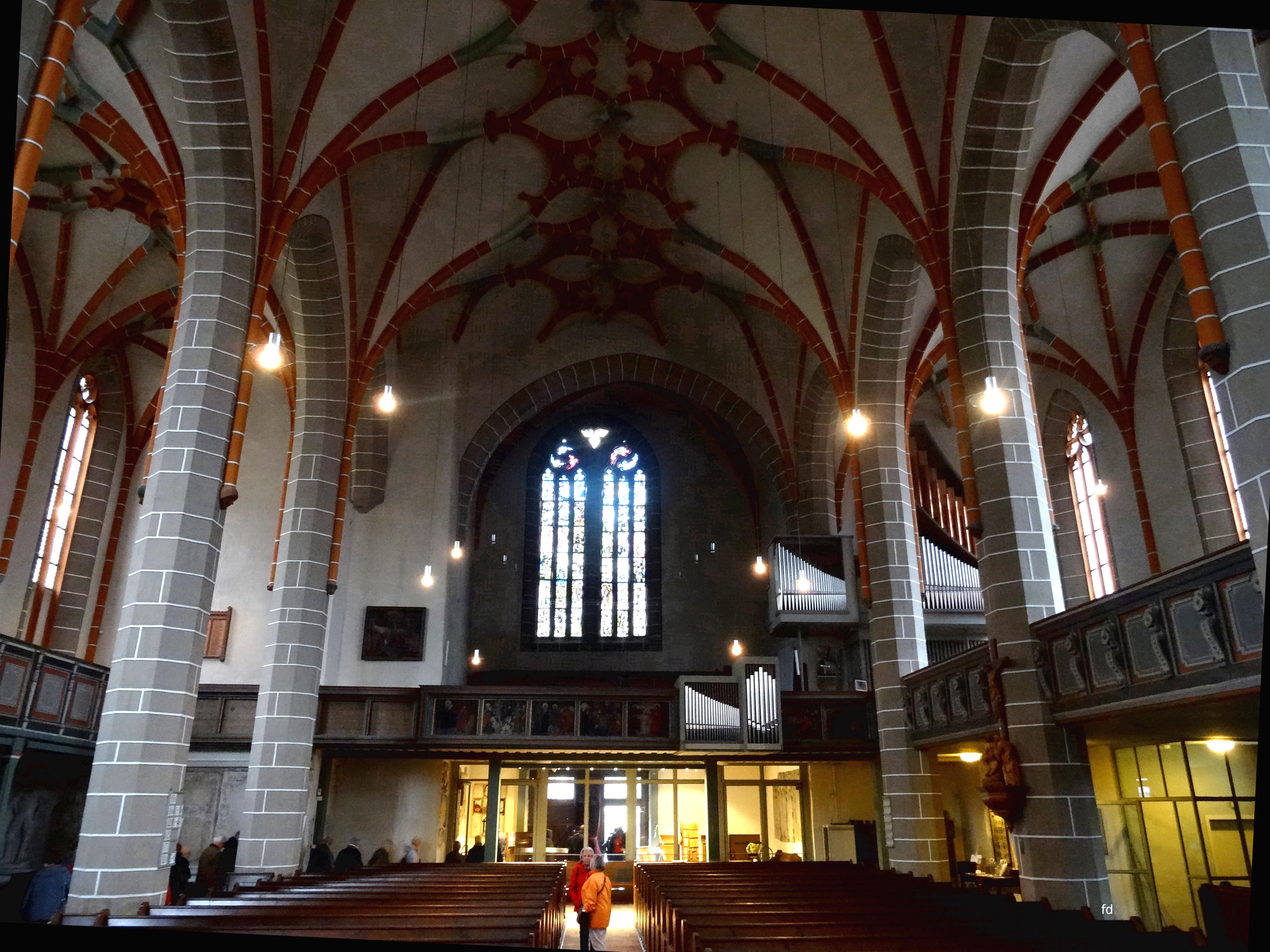 Stadtkirche St. Georg Schmalkalden Innenraum.